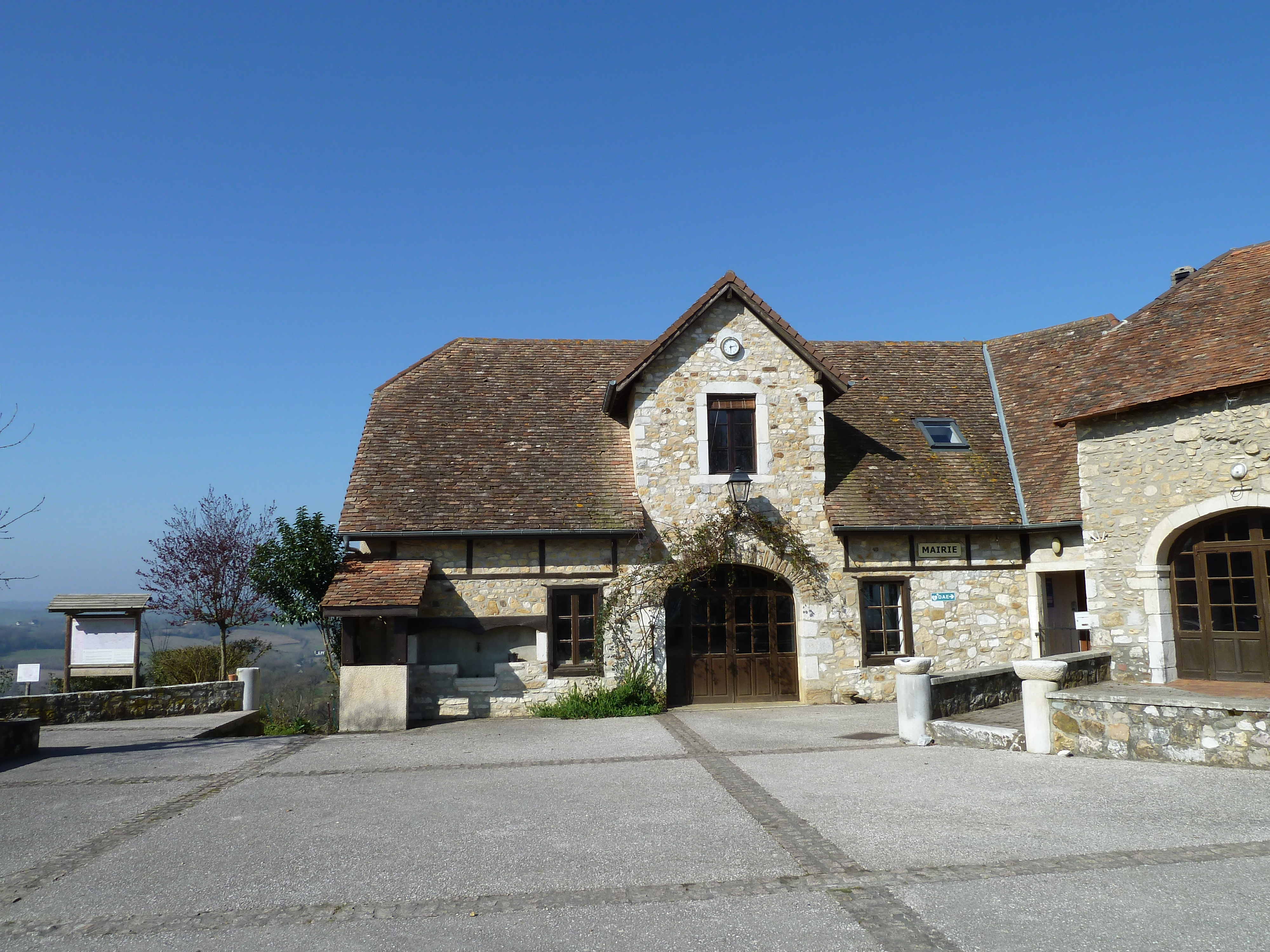 Mairie de Castetner